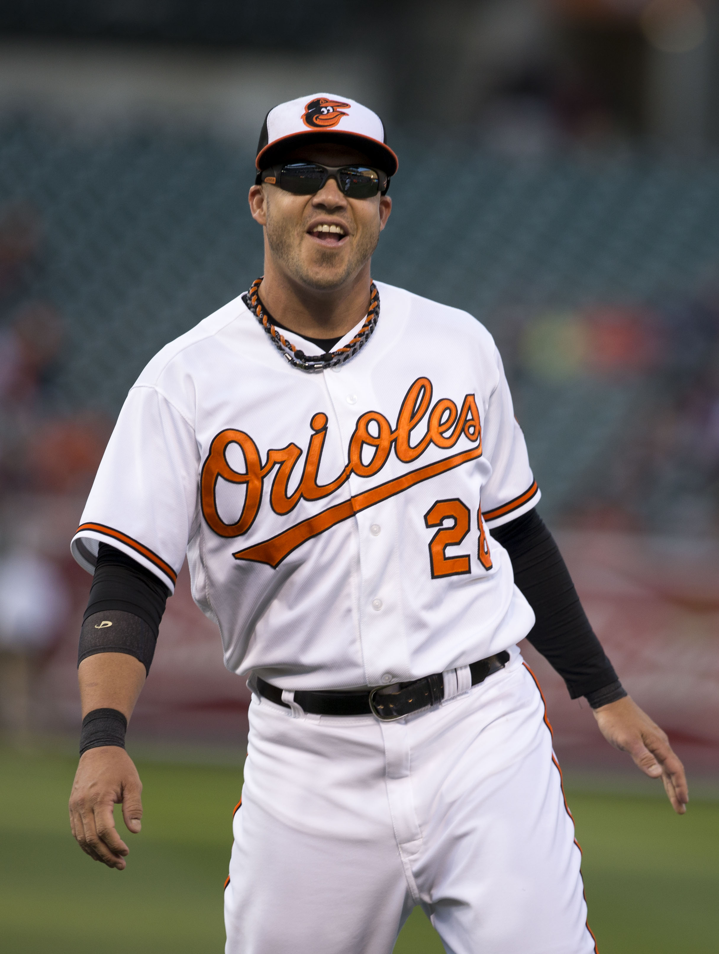 Yankees at Orioles 04/13/15